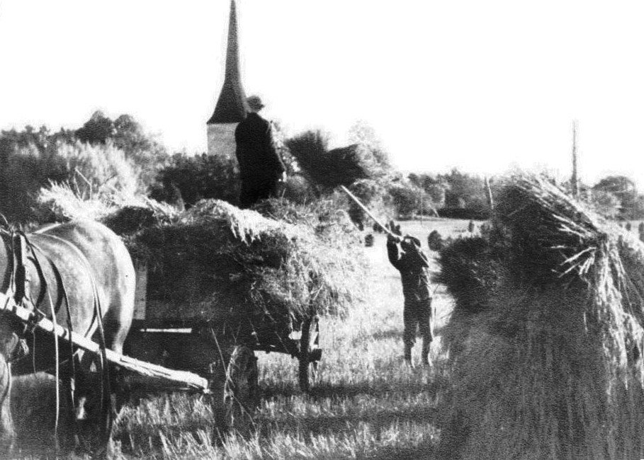 Skördetider på Hesslingby, åkern mellan kyrkan och gården. I lasset Gustaf Israelsson, Karl-Olof Almqvist lastar.